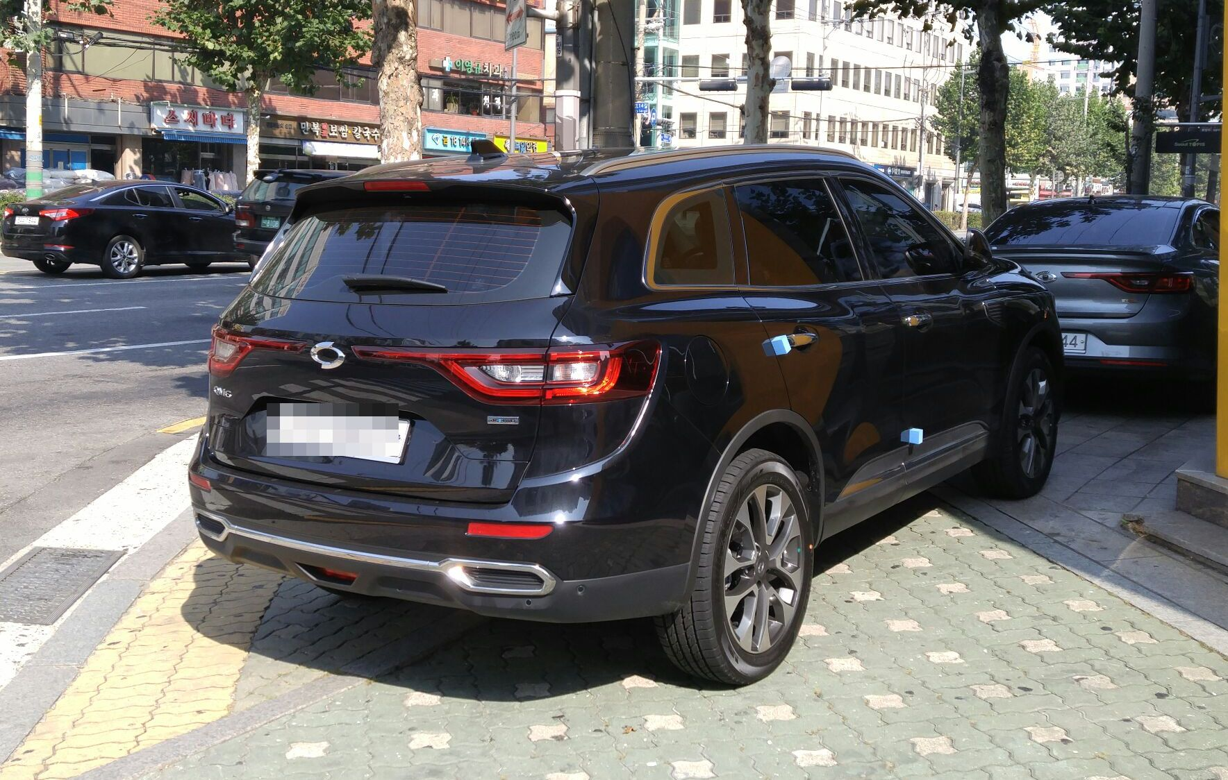 ルノーサムスン・QM6